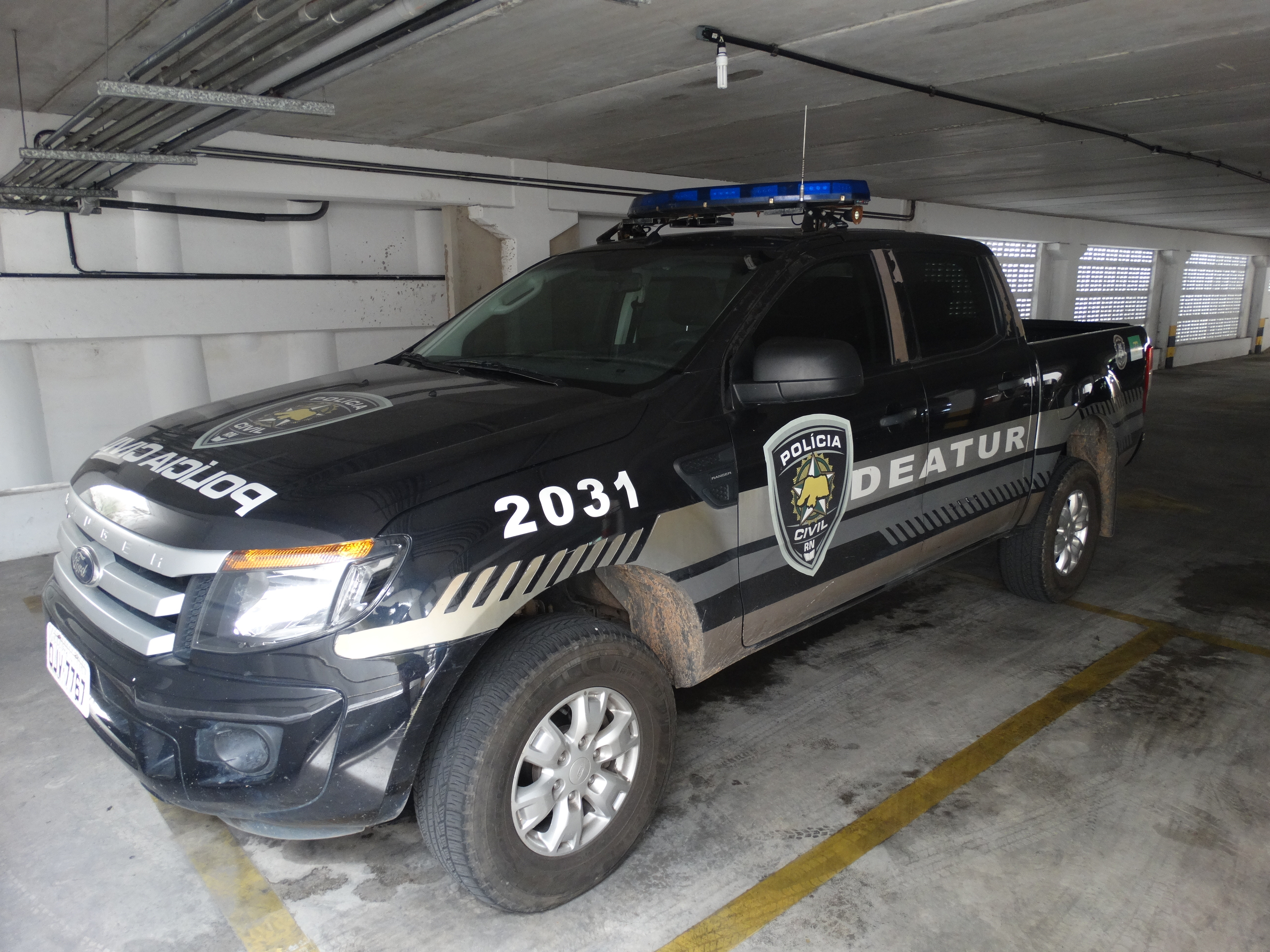 Rio Grande do Norte State police car